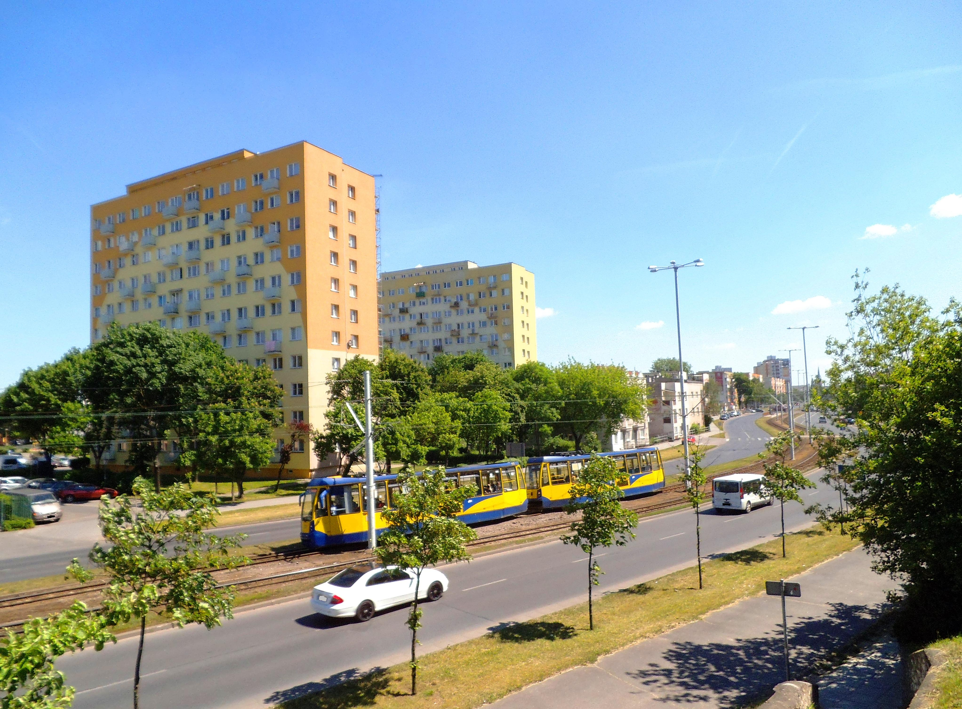 Ulica Kraszewskiego w Toruniu